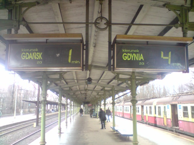 Wyświetlacze SKM w Sopocie (obecnie już nie istniejące).